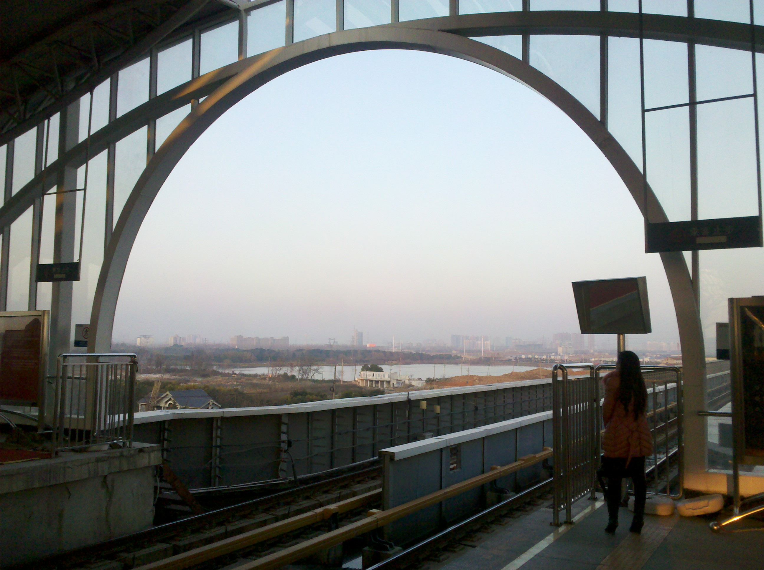 Dongxihu, Wuhan, Hubei, China